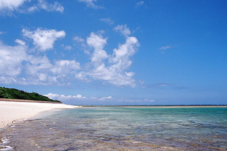 粟国村長浜ビーチ